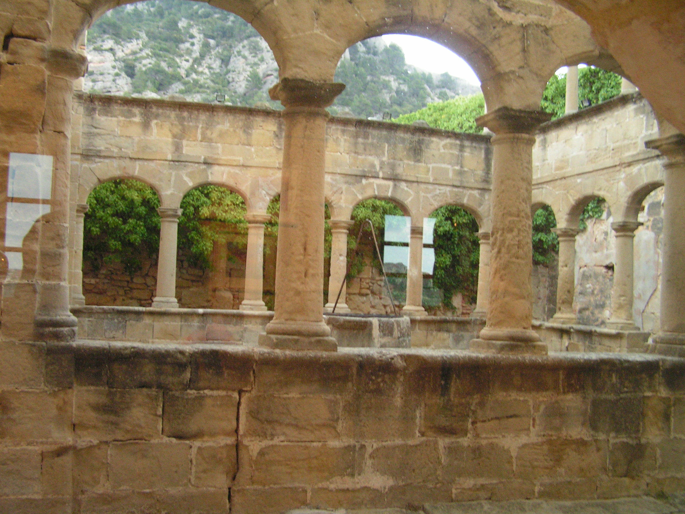 Claustre del monestir de Sant Salavdor a Jorta de Sant Joan